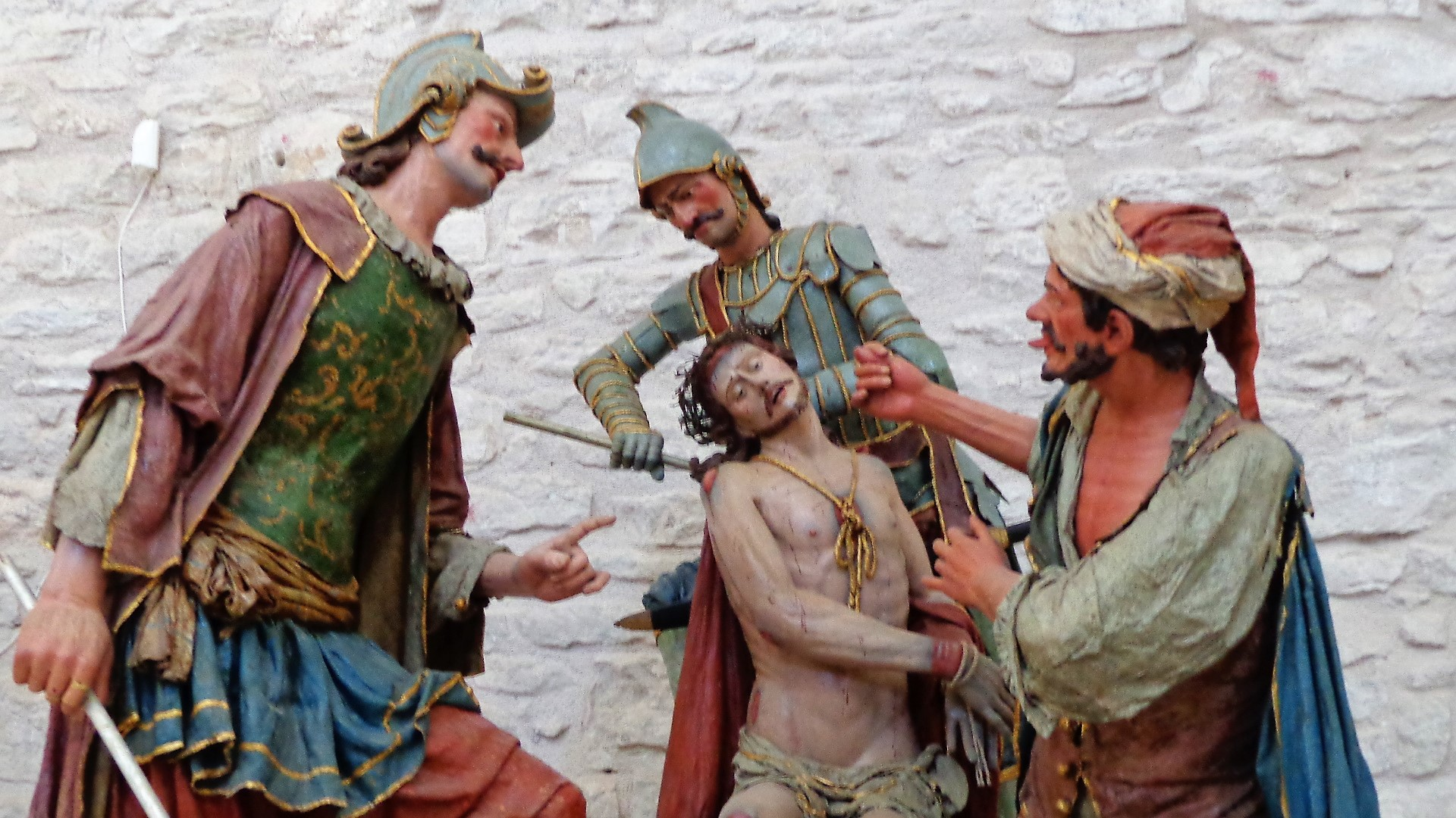 Misteri